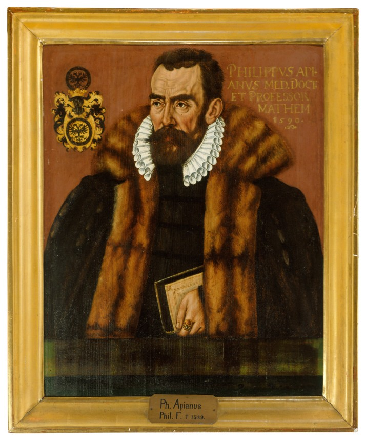 Prof. Philipp Appian (Öl auf Holz, Tübinger Professorengalerie)